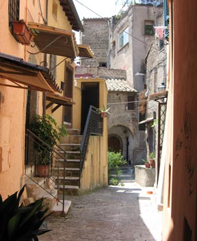 Morlupo (Rm) - Vicolo del Rione Borgo